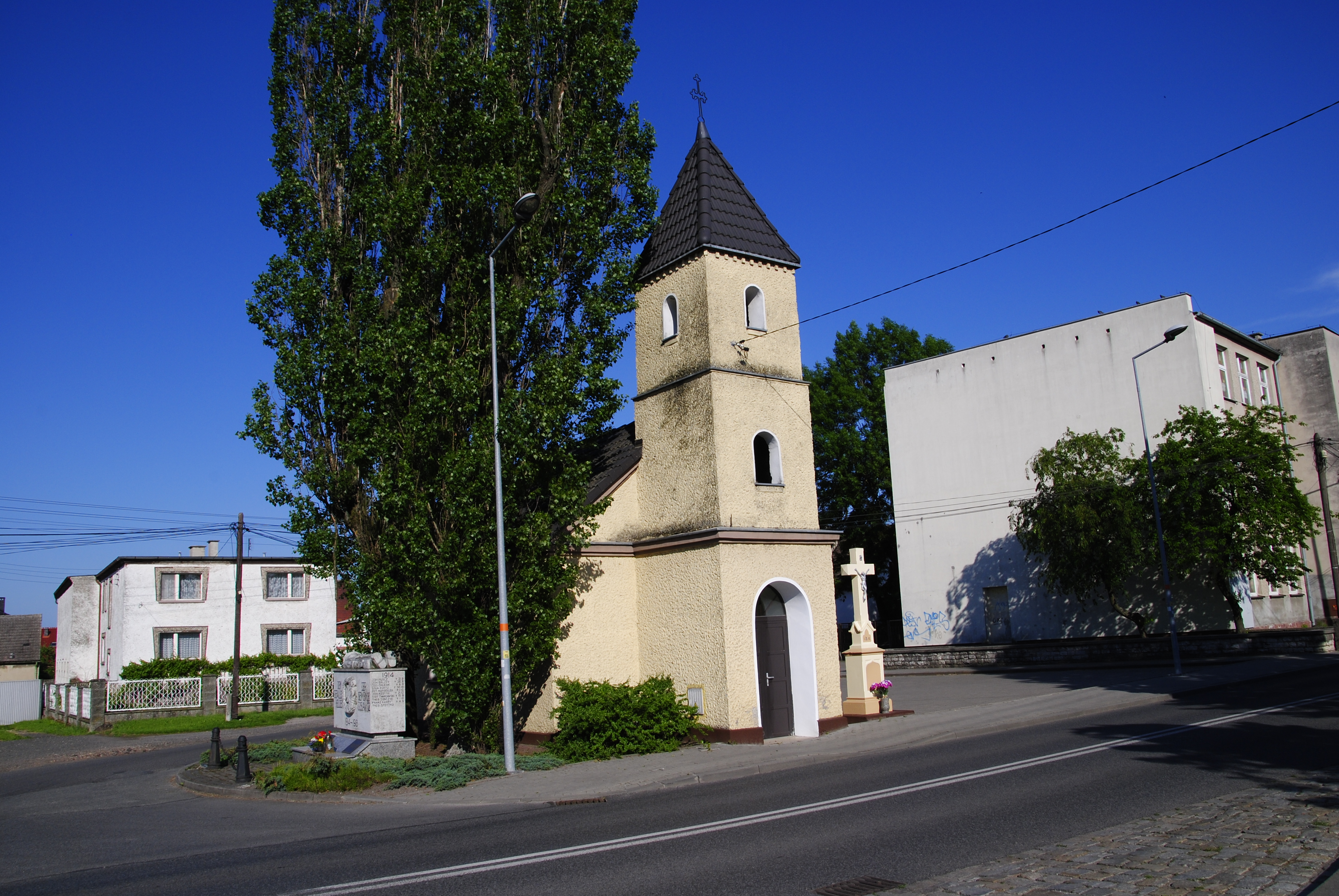 Chapel in Opole-Gosławice